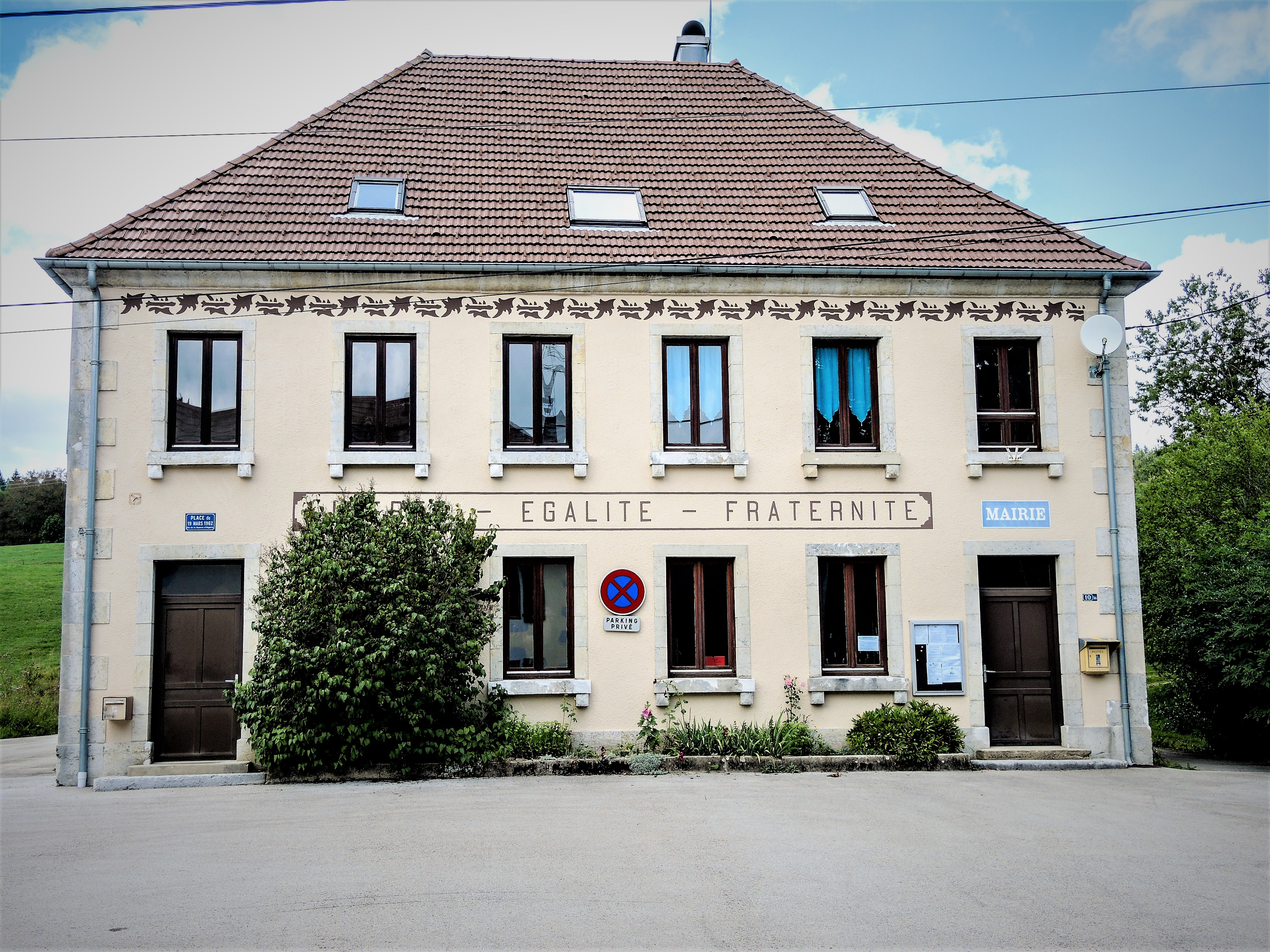 Façade de la mairie de Petite-Chaux. Doubs